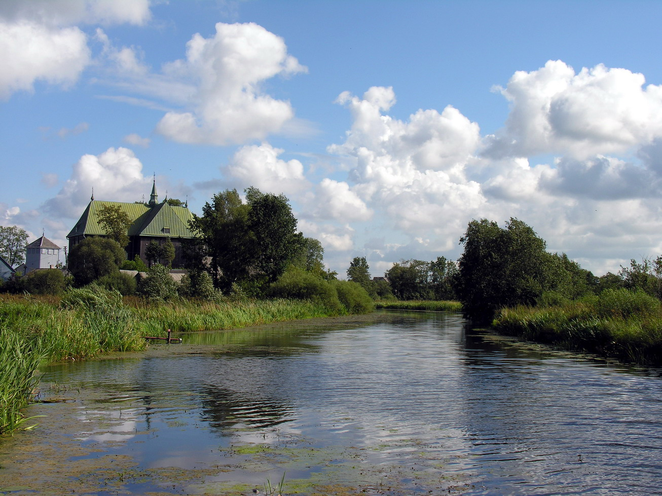 Seda, Mažeikių raj. Sedos Švč. Mergelės Marijos Ėmimo į dangų bažnyčia Foto: Algirdas, 2006 m. rugsėjo 2 d., Lietuva